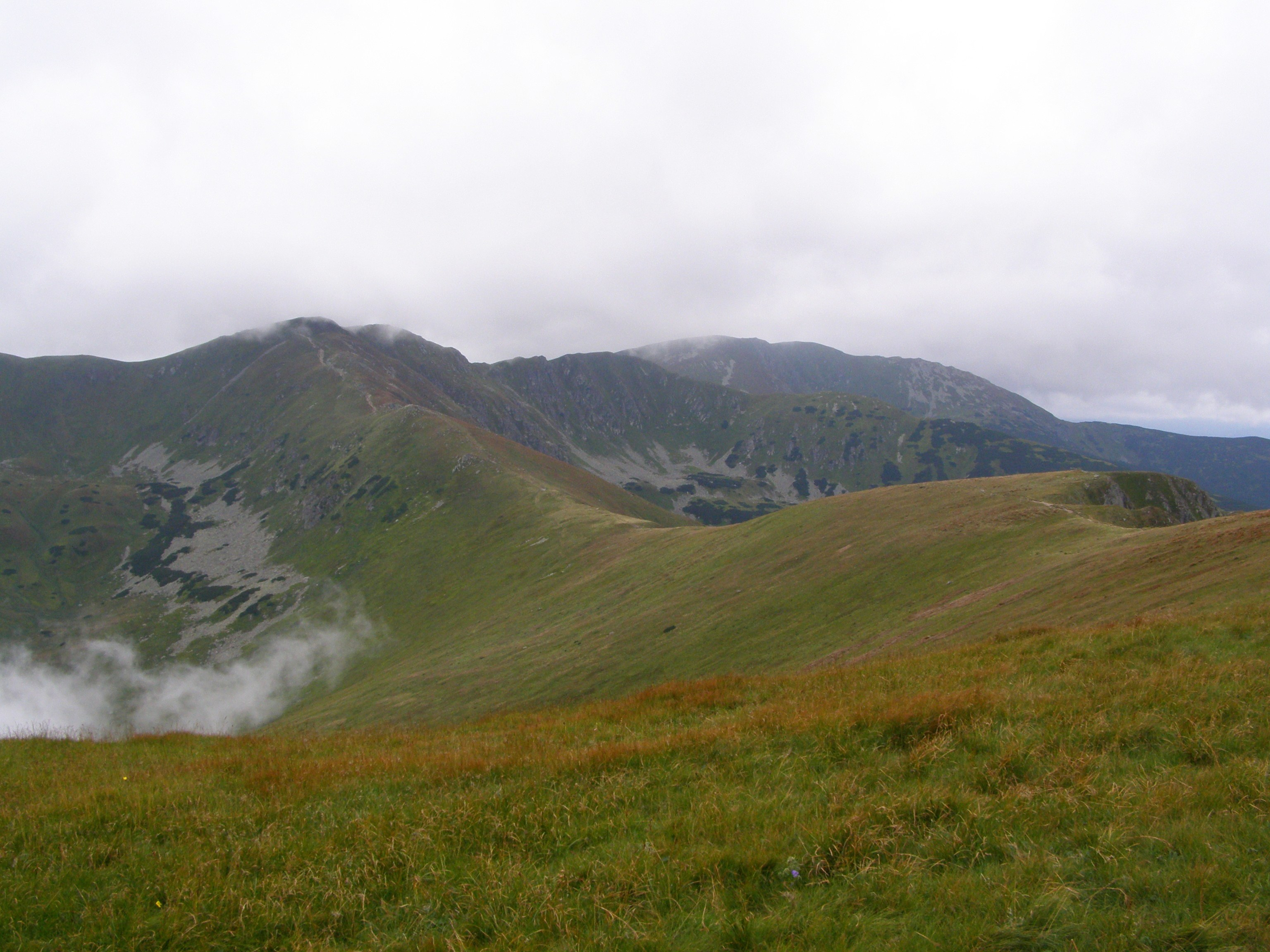 Nízké Tatry, Ďumbierské Tatry, výhled z úbočí vrcholu Poľana (1890 m): východní strana vrcholu Kotliská (1937 m), v pozadí uprostřed Chabenec (1955 m)